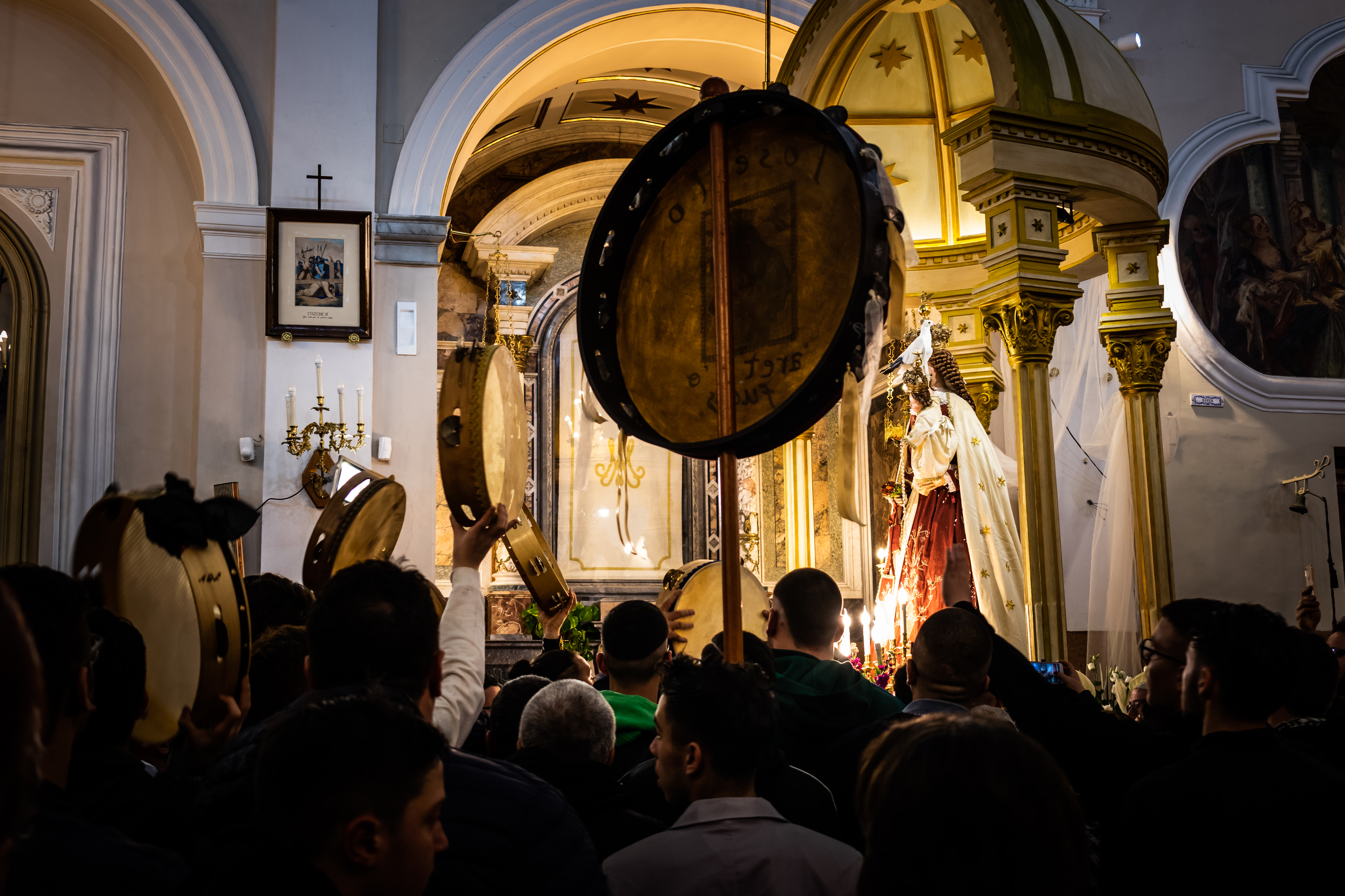 Deposizione delle tammorre, Festa della Madonna delle Galline 2018